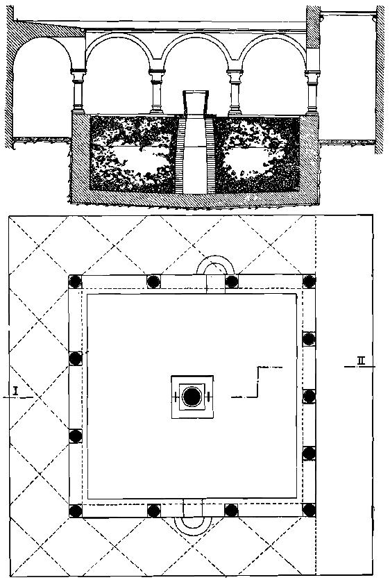 Cisterne